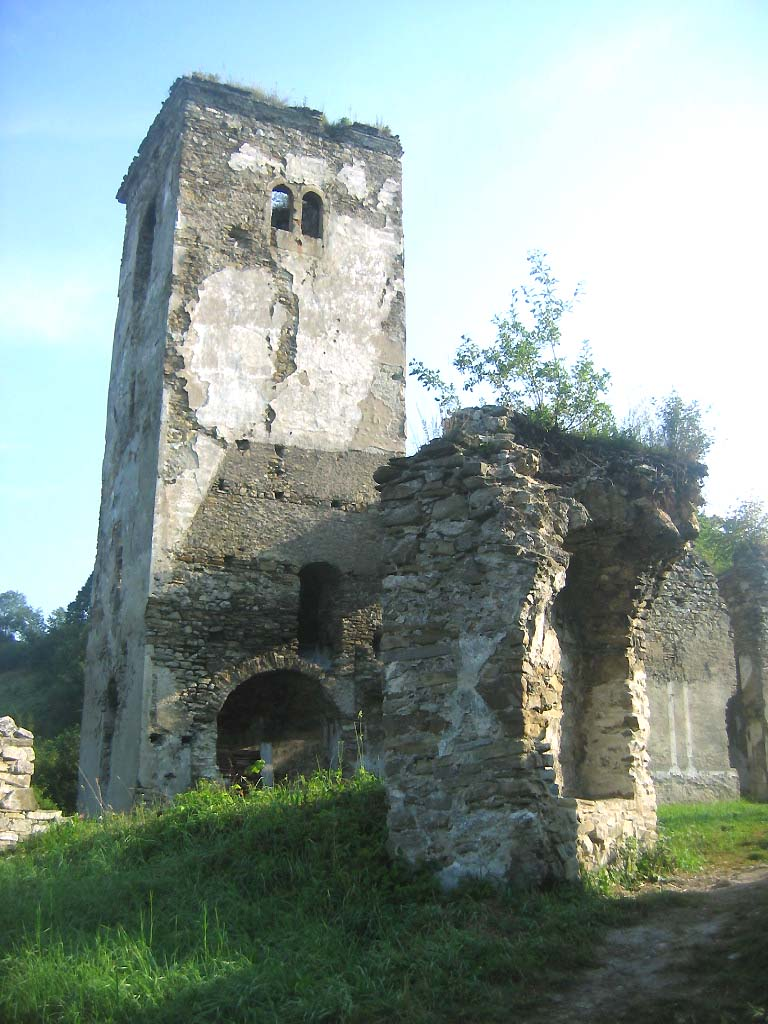 Kostol svätých Kozmu a Damiána, Sedliacka Dubová